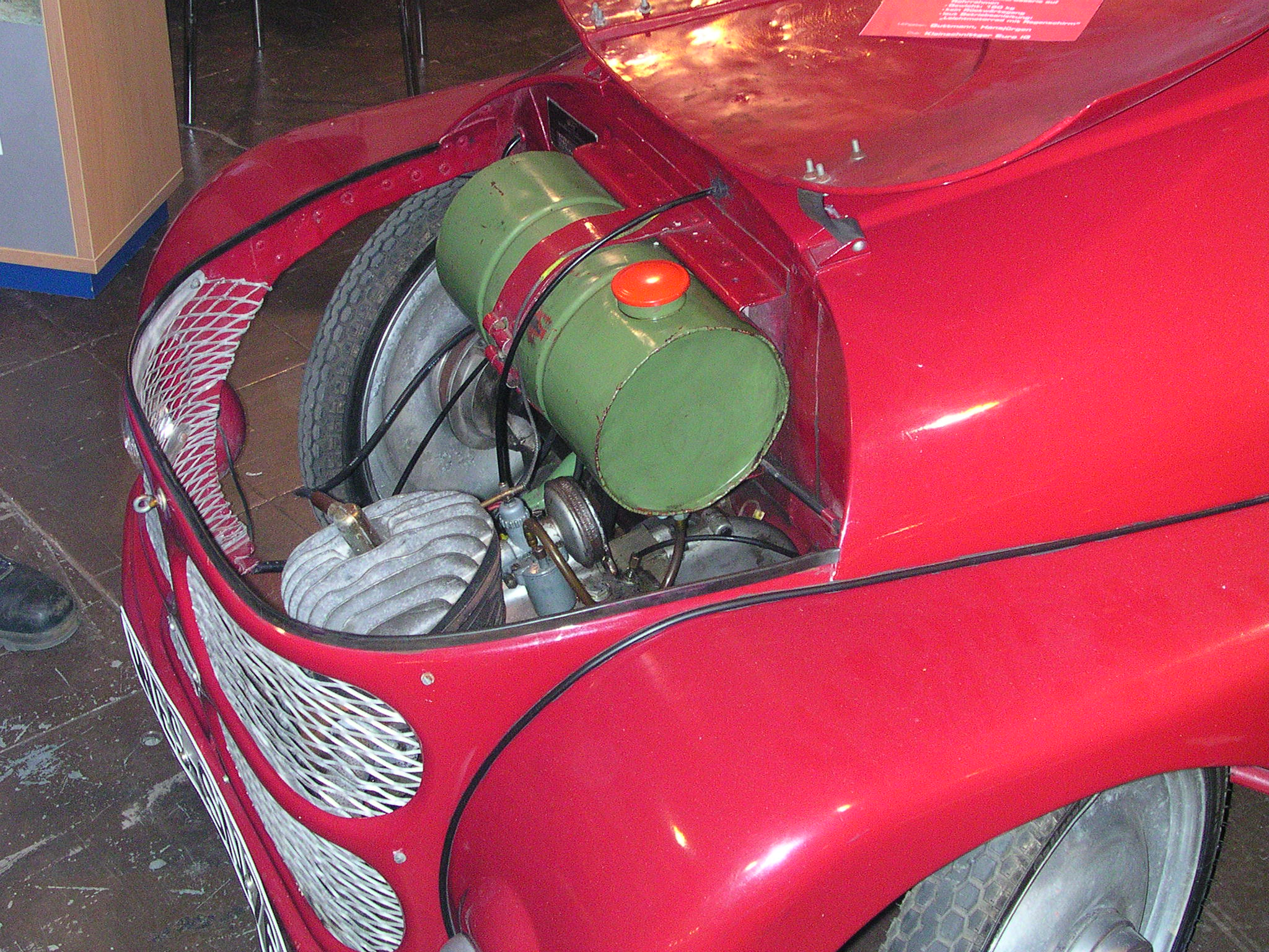 Kleinschnittger, gesehen bei der Technoclassica in Essen 2005